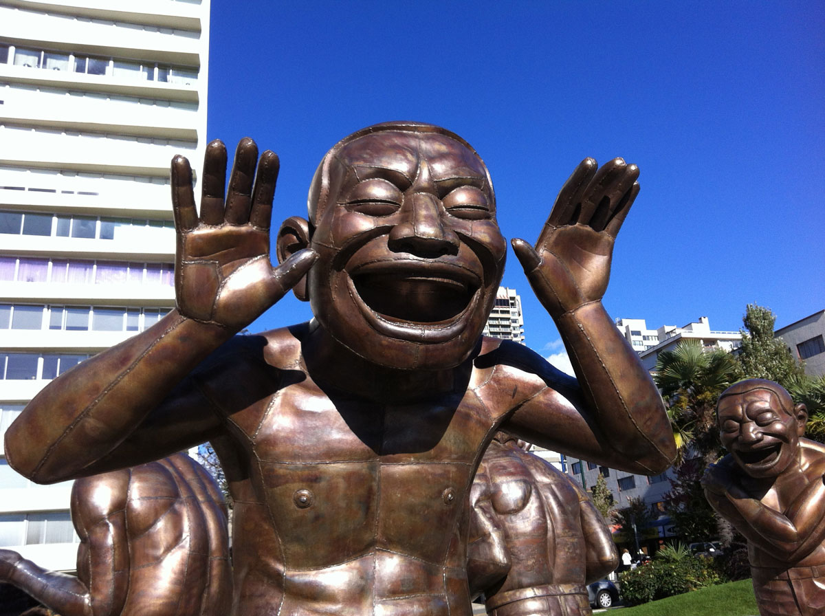 Skulpturenpark »A-maze-ing Laughter« von Yue Minjun in Vancouver